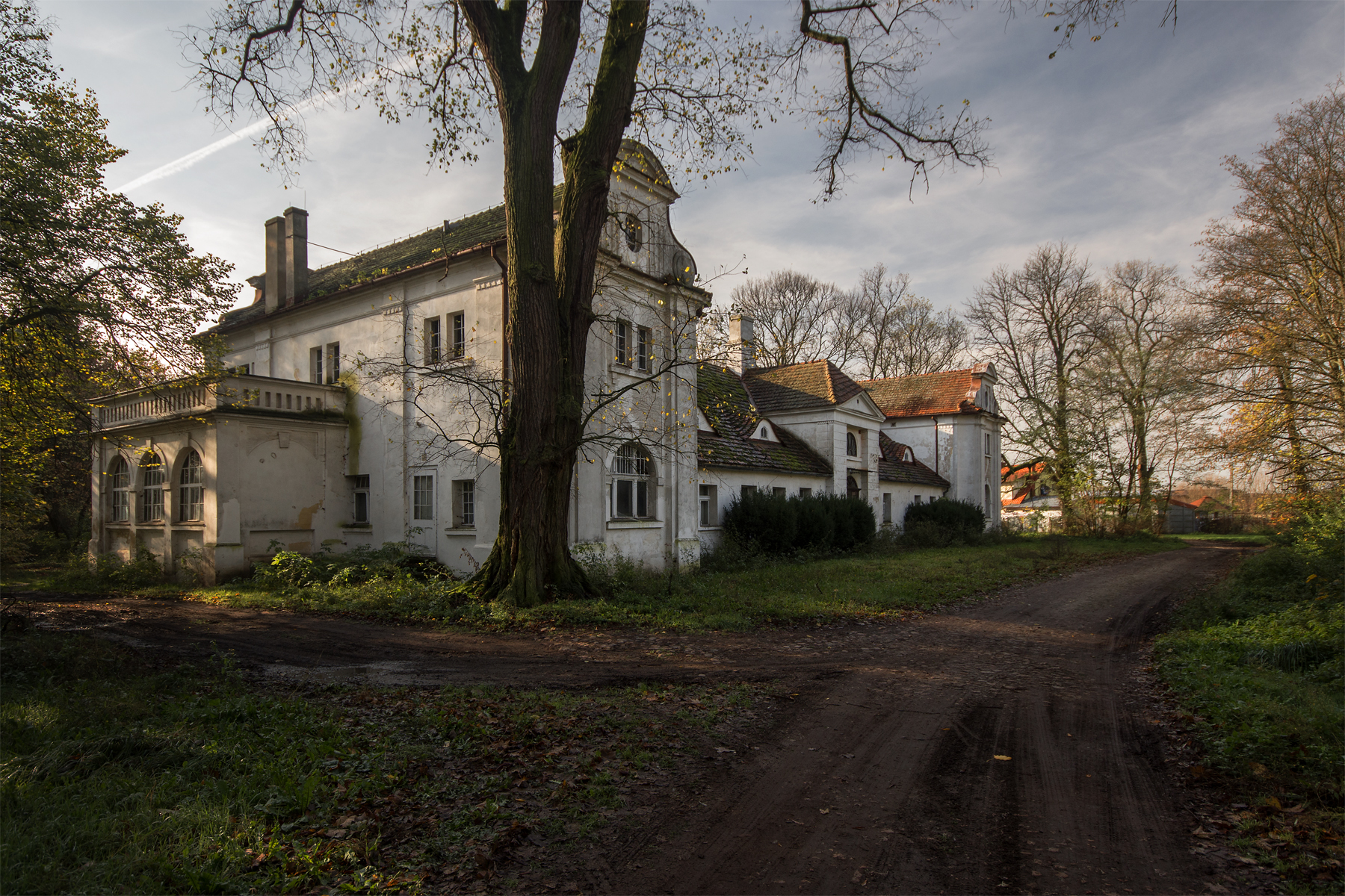 Oporowo, dwór, XVIII, 1902